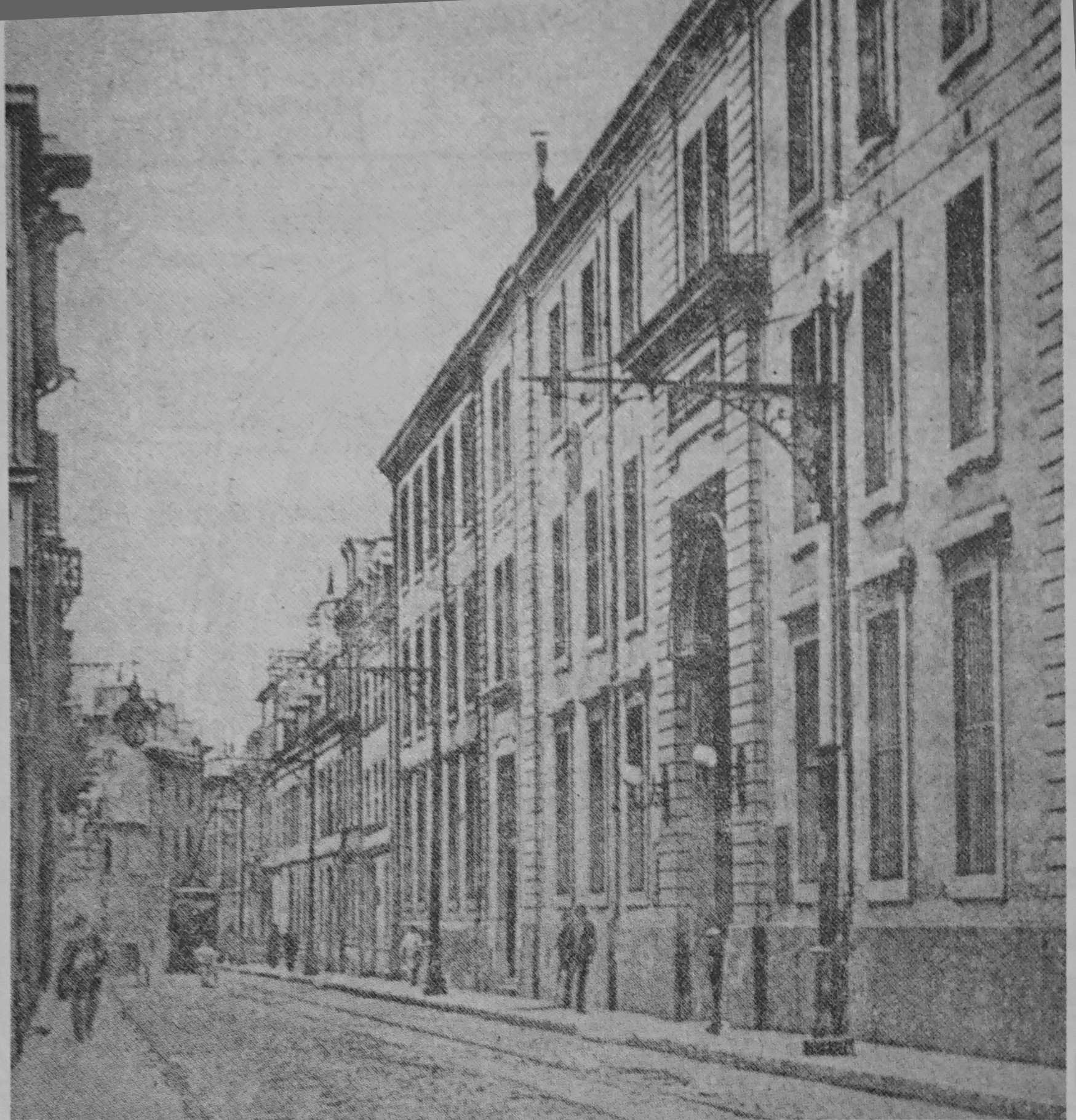 sur une vue ancienne.